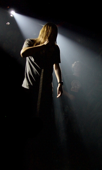 Maciej Miskiewicz (voc.) z zespołu Elysium na koncercie w klubie Madness. Wrocław, 20 stycznia 2006.